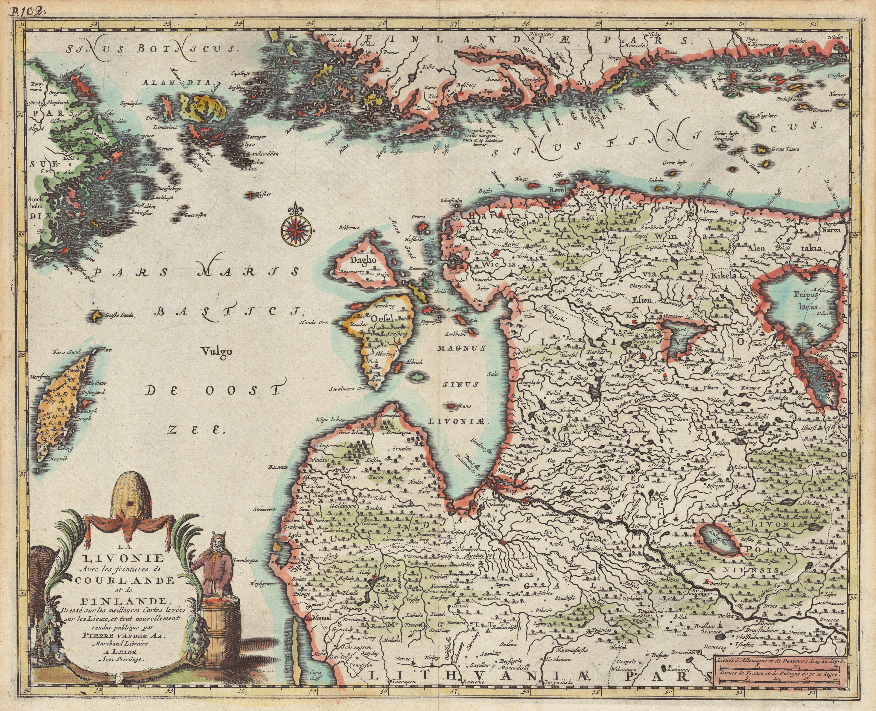 La Livonie avec les frontieres de Courlande et de Finlande Published in: Galerie Agréable du monde in Leiden in 1729. Copper engraving, Ca 1:2 200 000, 35 x 28 cm.